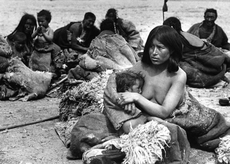 Lhasa, Ngoloklager, Nomadin